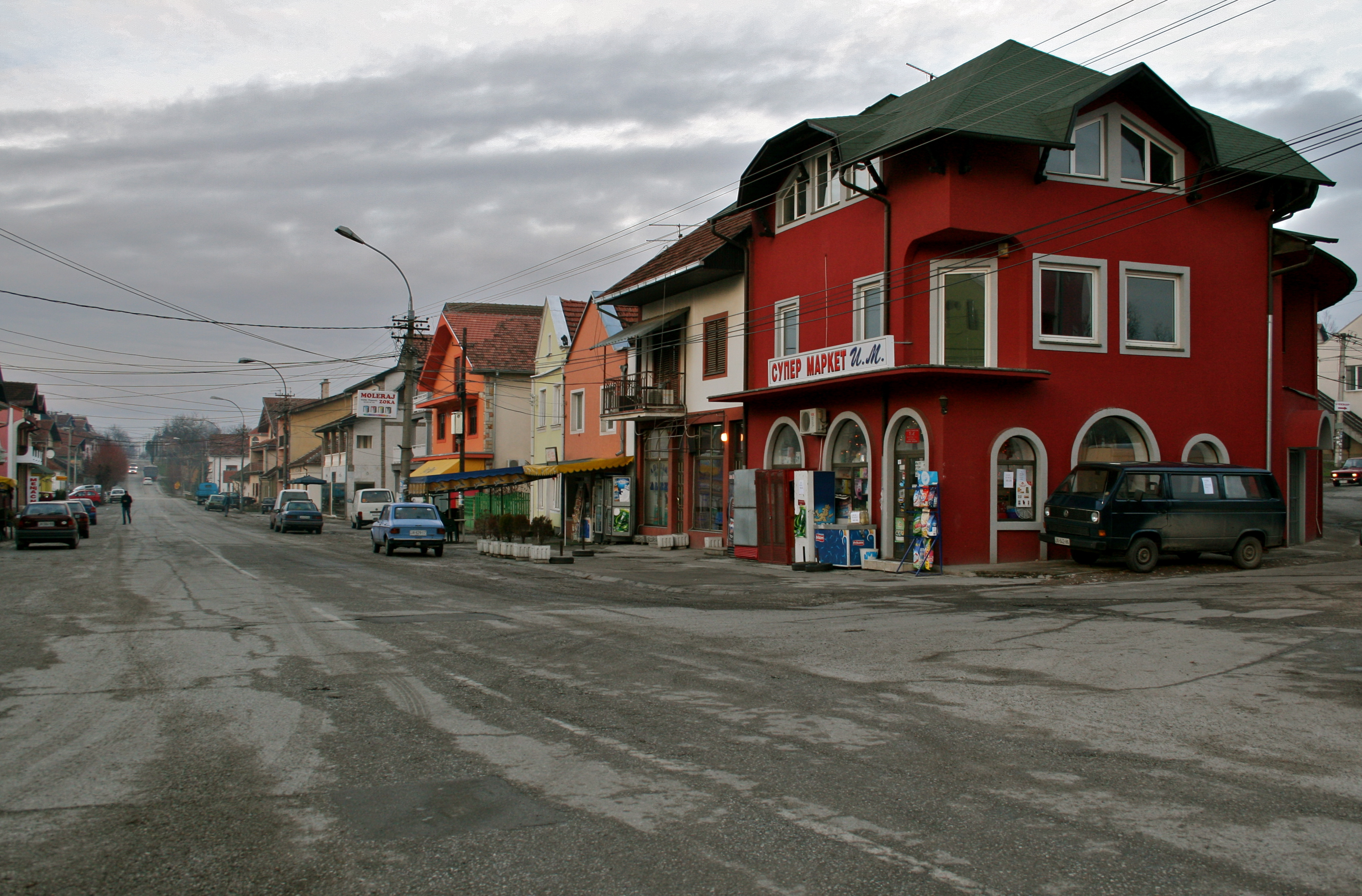 Велики Поповић, поглед на главну улицу, кроз коју пролази пут